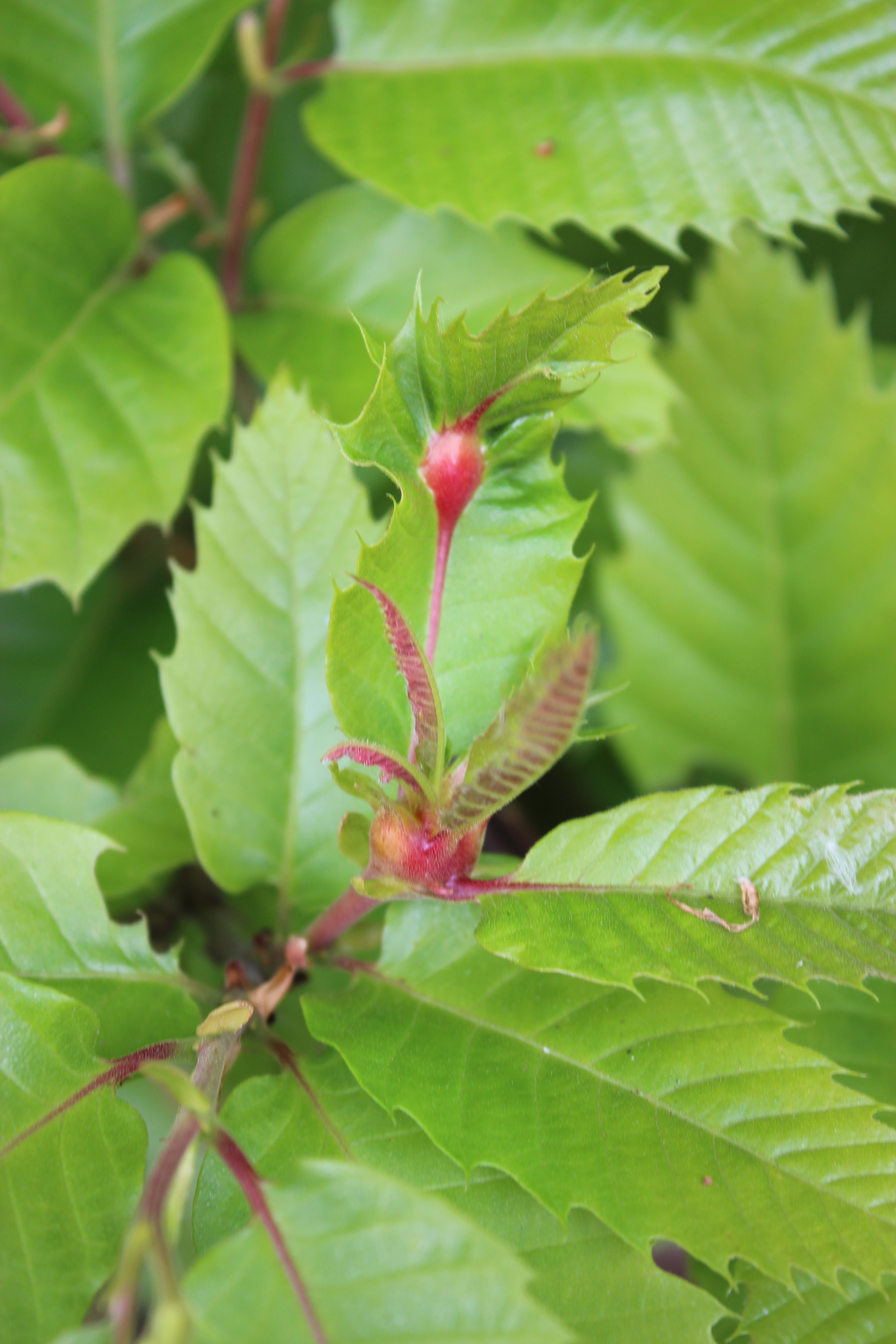 Galle, Cynips du châtaignier (Dryocosmus kuriphilus)